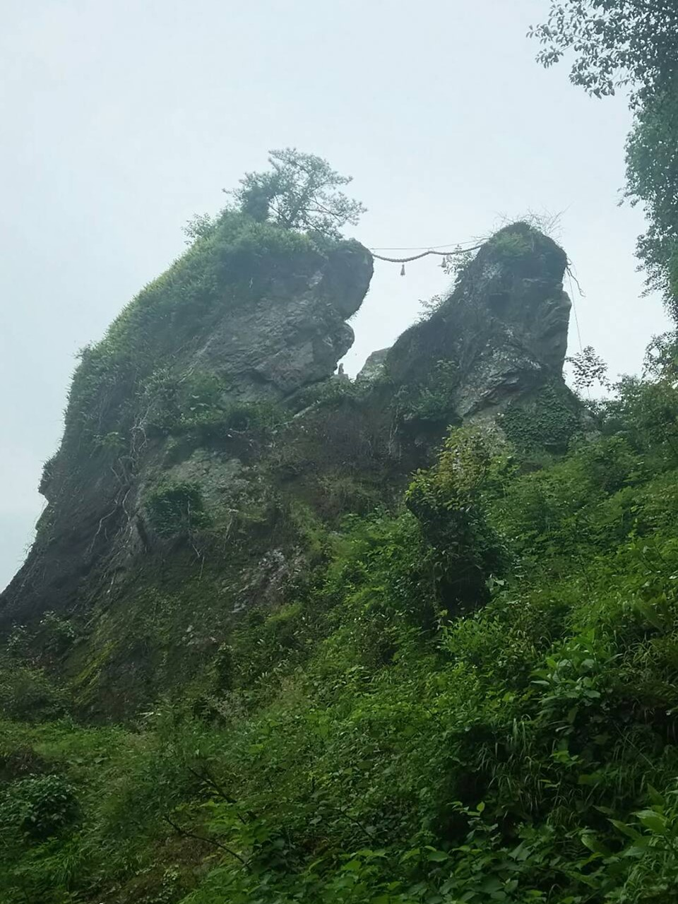 地名の由来でもある2つの大岩。周辺は公園として整備されています。